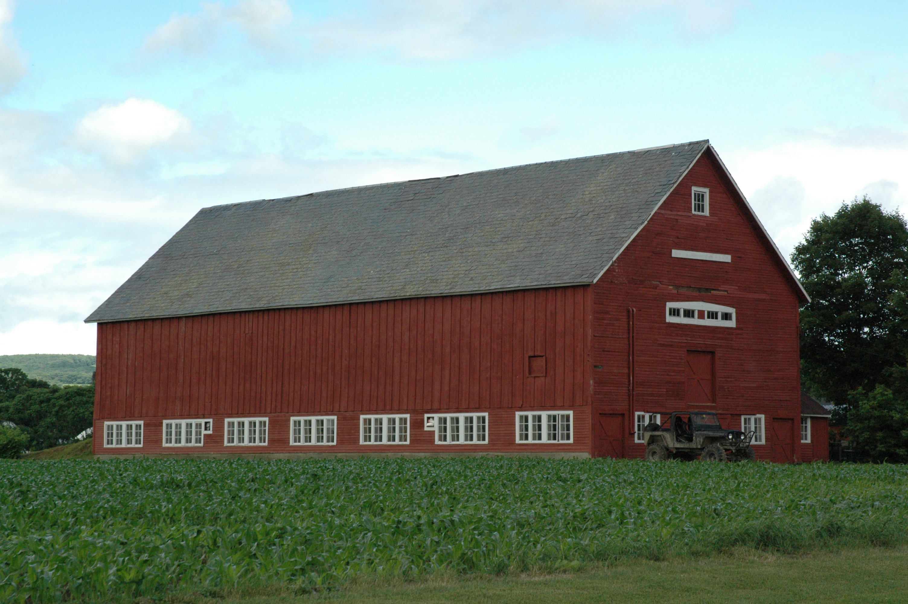 Barn in Westminster, Vermont